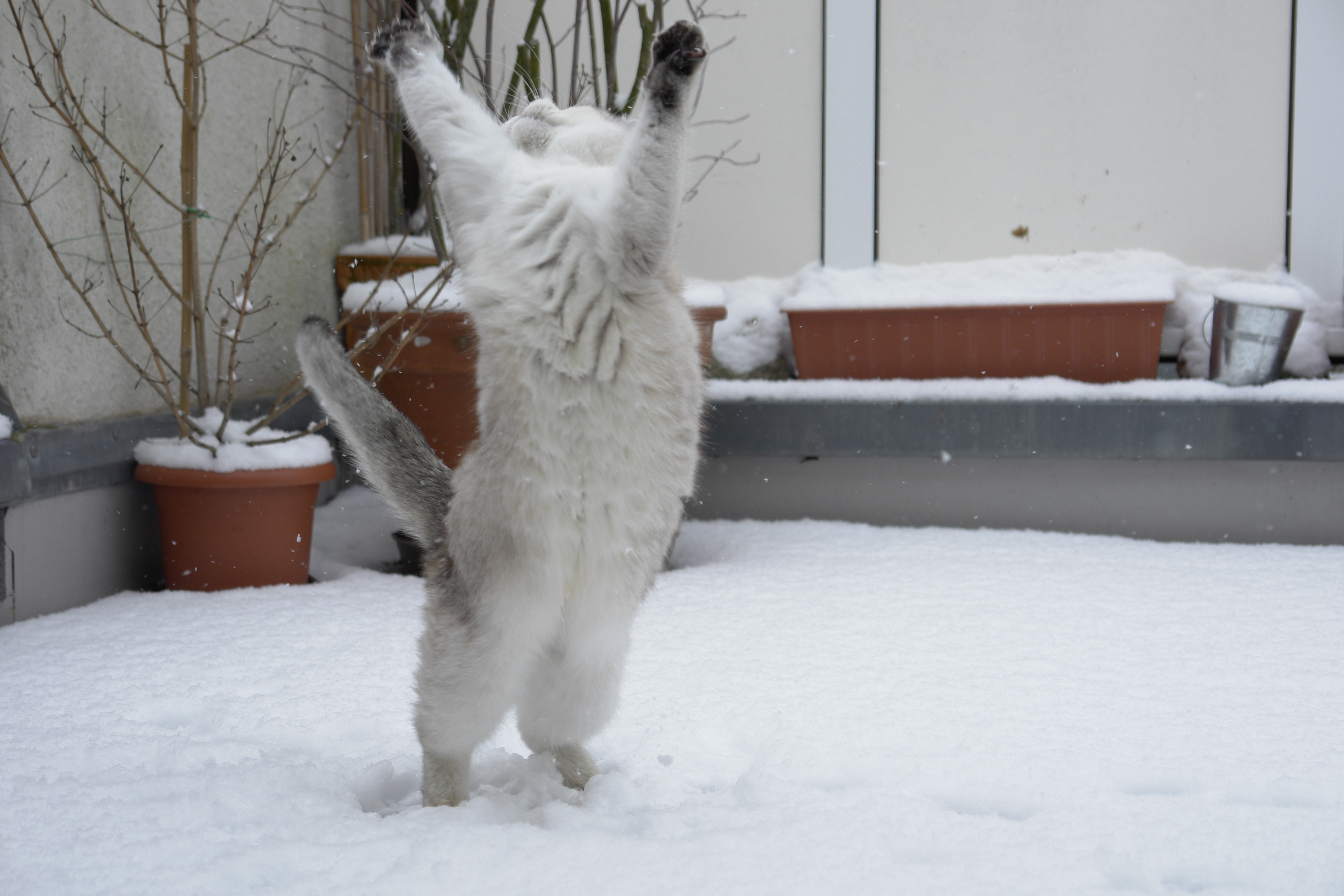 Yippieeee